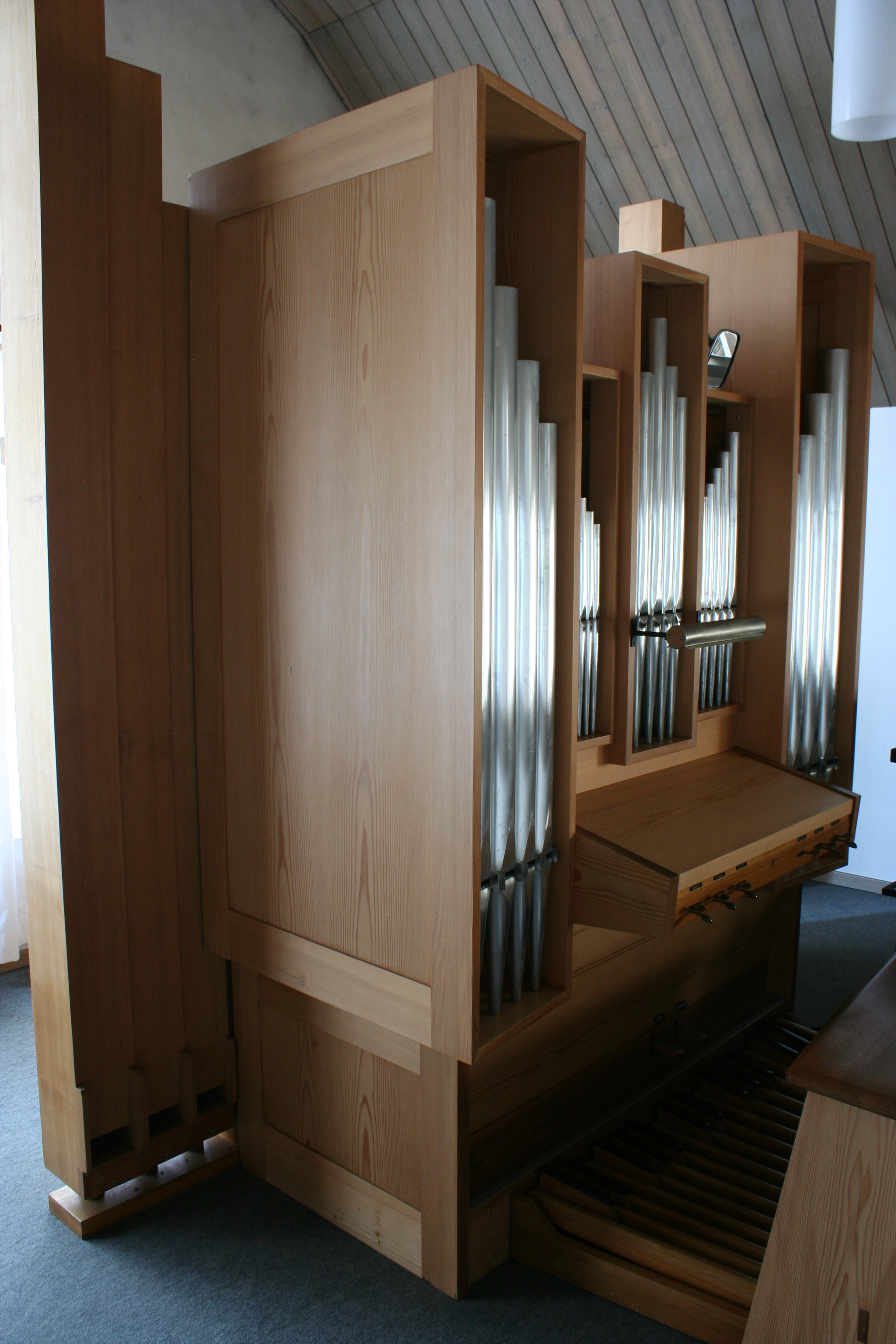 Römisch-katholische Kirche St. Josef Lindau-Grafstal, Orgel